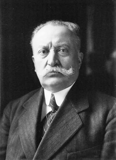 M. Augagneur, député de Lyon : photographie de presse